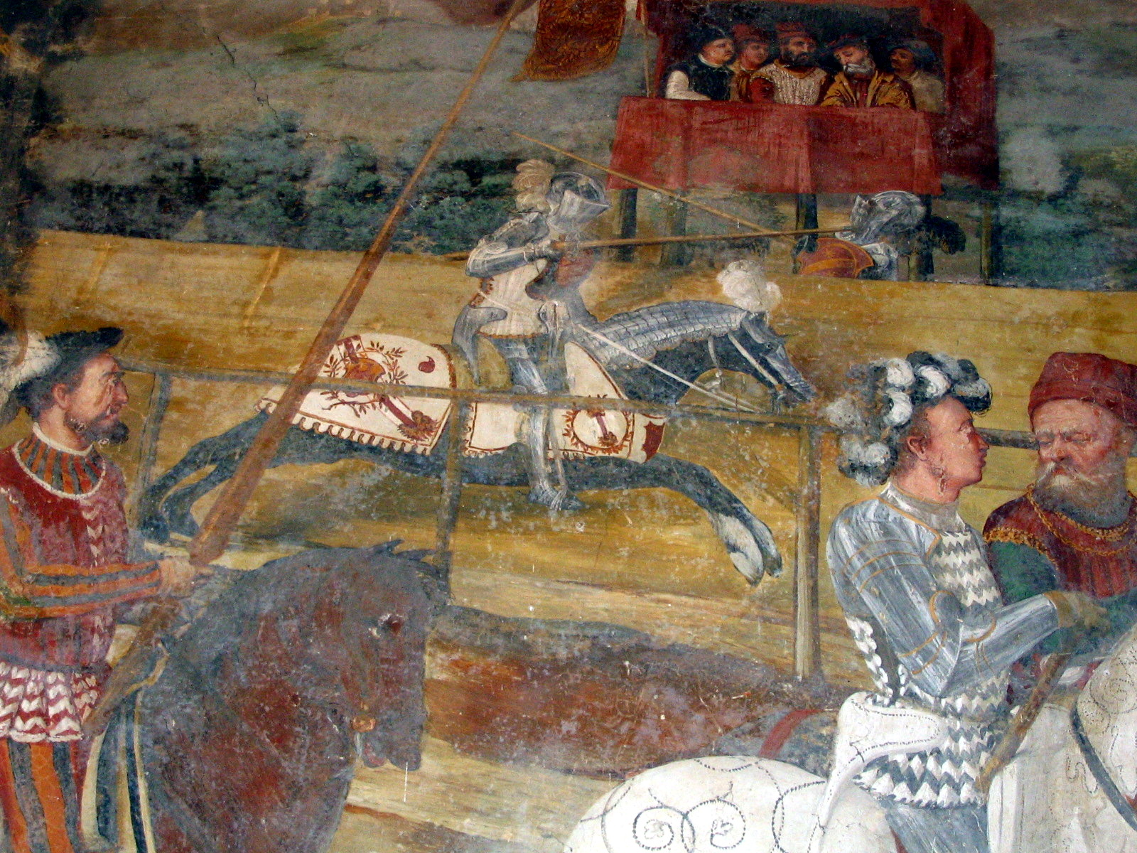 Il Romanino, Cristiano I di Danimarca assiste ad un torneo assieme a Bartolomeo Colleoni (1467). Dettaglio. Affresco del Castello di Malpaga, già di Bartolomeo Colleoni. Foto di Giorces.